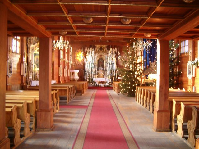 Widok na przebiterium w kościele parafialnym pw. Św. Tekli w Dobrzycy, powiat pleszewski, woj. wielkopolskie.